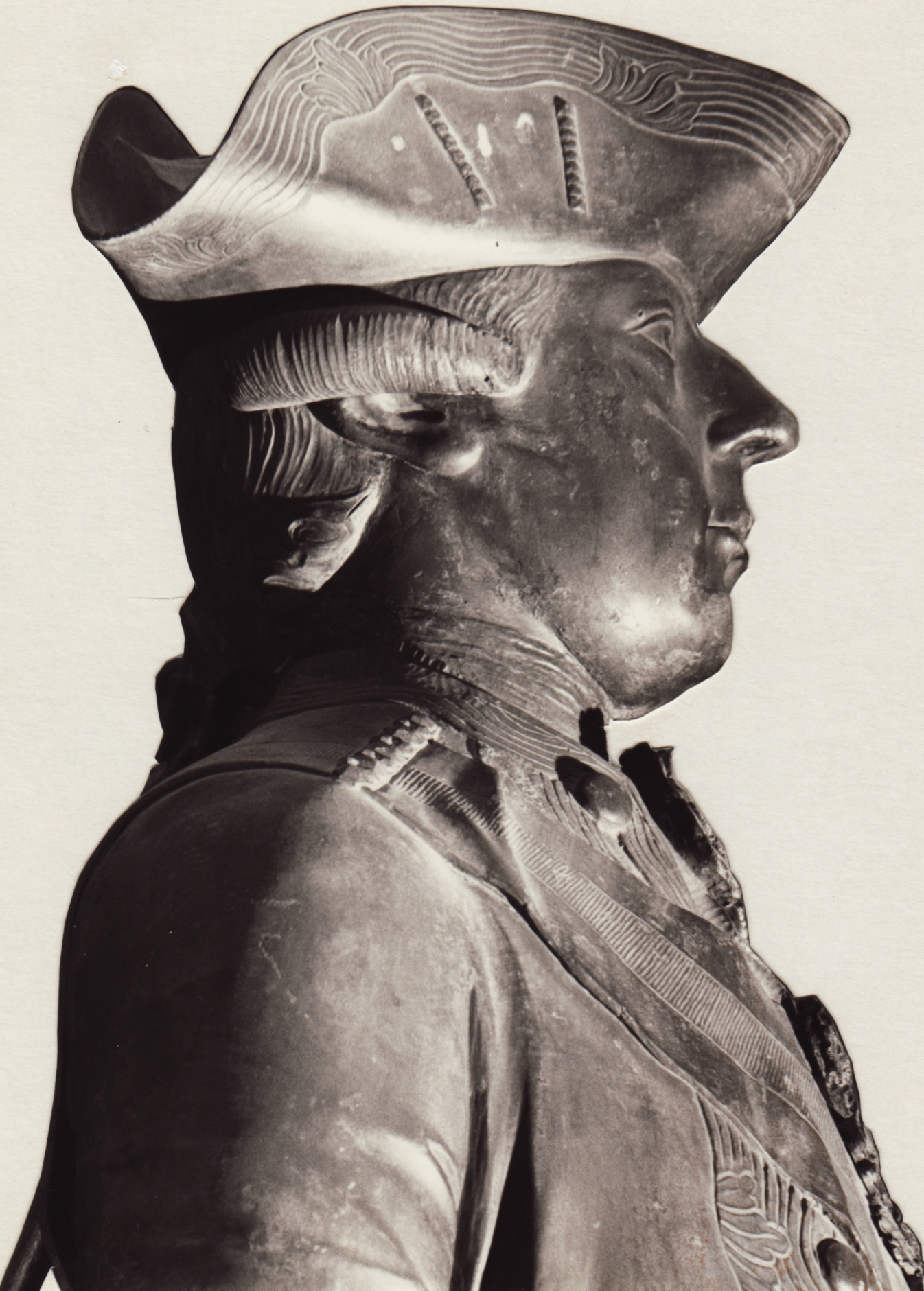 Balthasar Moll (1717–1785): Reiterstandbild Kaiser Josephs II. auf Schloss Laxenburg, 1776/77 (Detail)